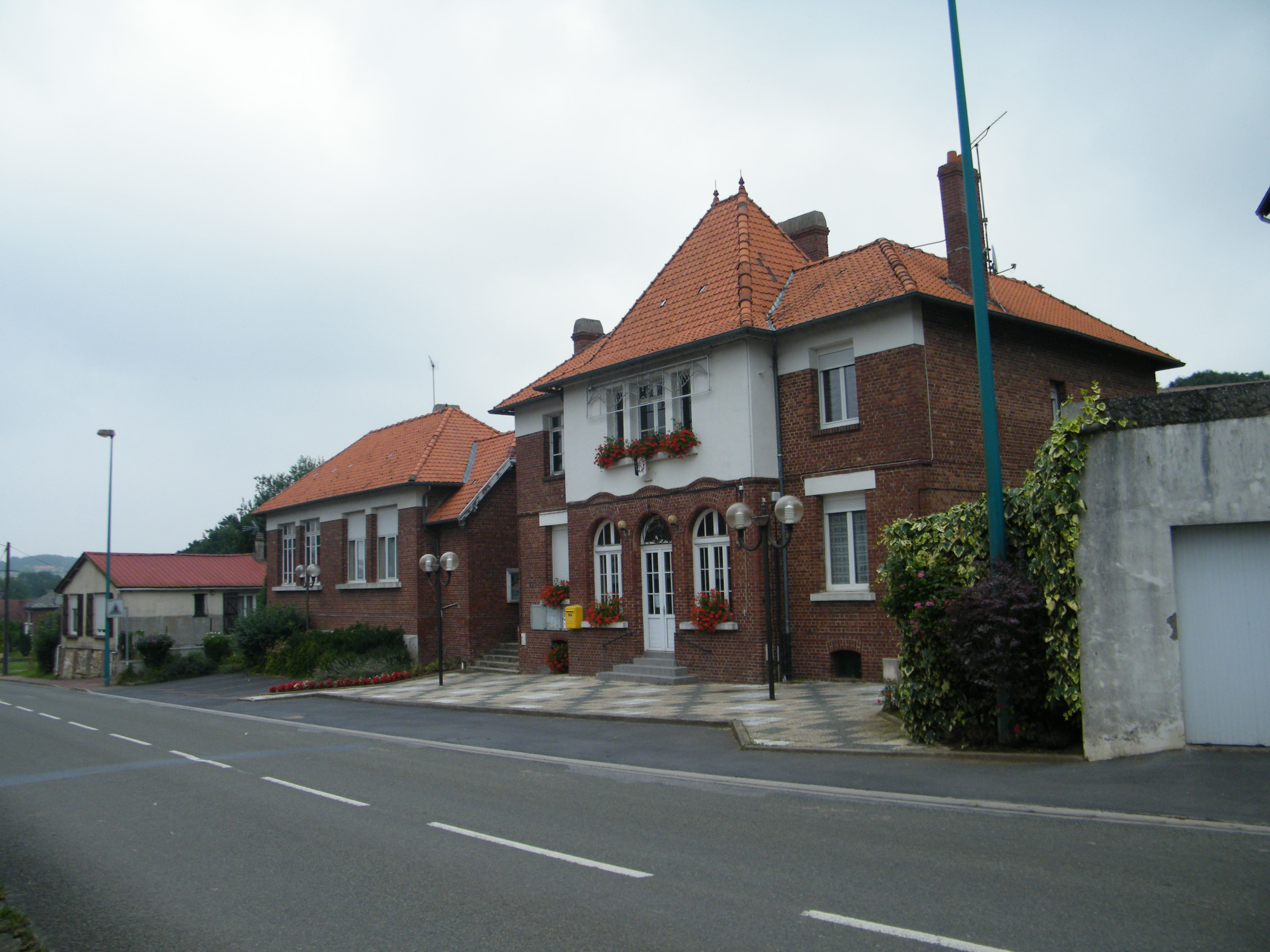 Mairie-école, reconstruite après la Première Guerre mondiale.